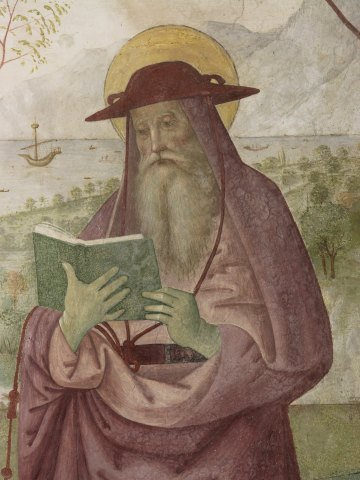 San Girolamo, part. affresco, Stroncone, Italy